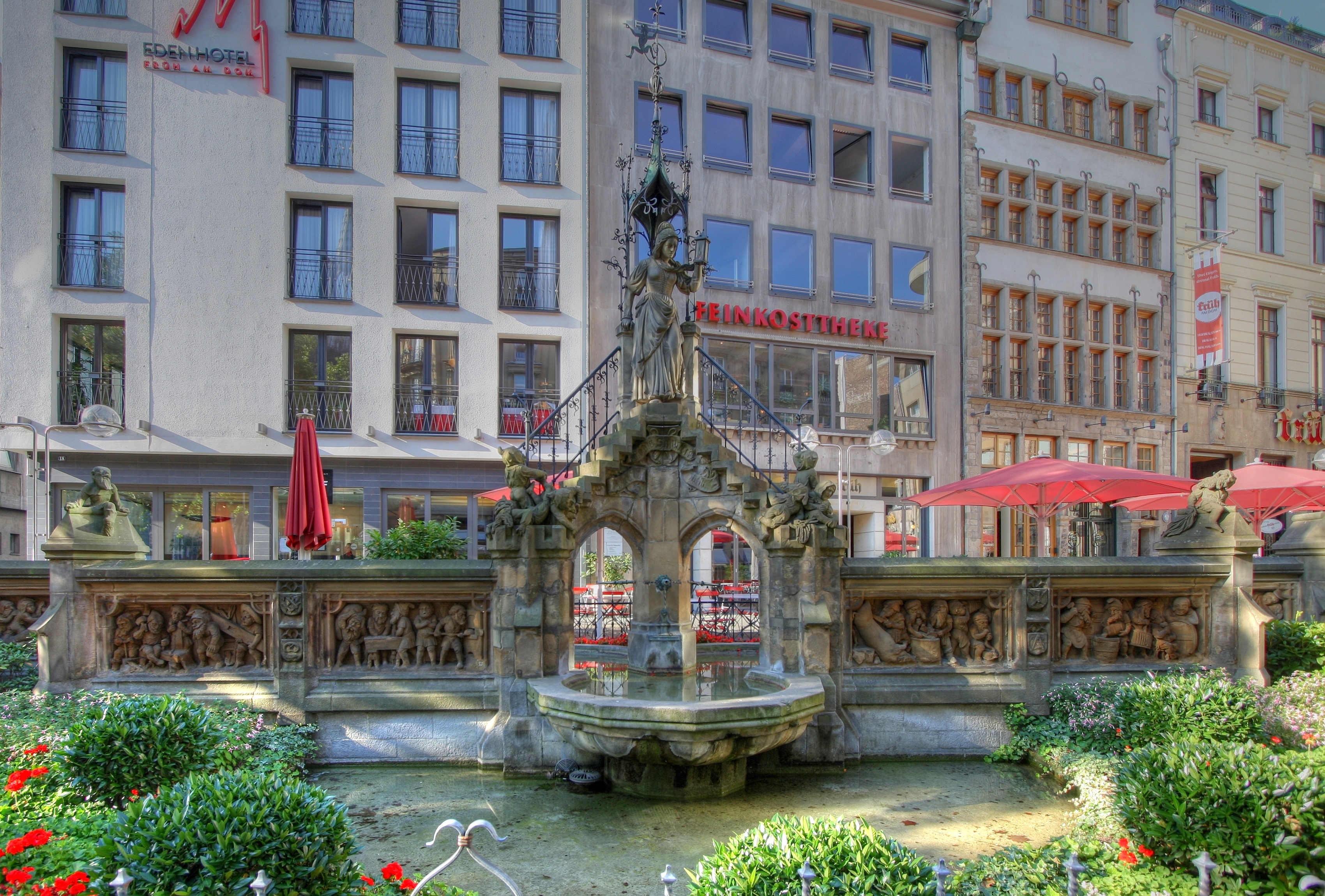 Heinzelmännchenbrunnen in Köln. Gesamtansicht. Künstler: Edmund und Heinrich Renard. This is a photograph of an architectural monument.